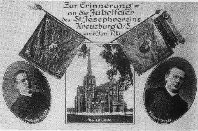 Kościół katolicki pw. MBWW - otwarcie 1 czerwca 1913 r. po dwuletniej budowie